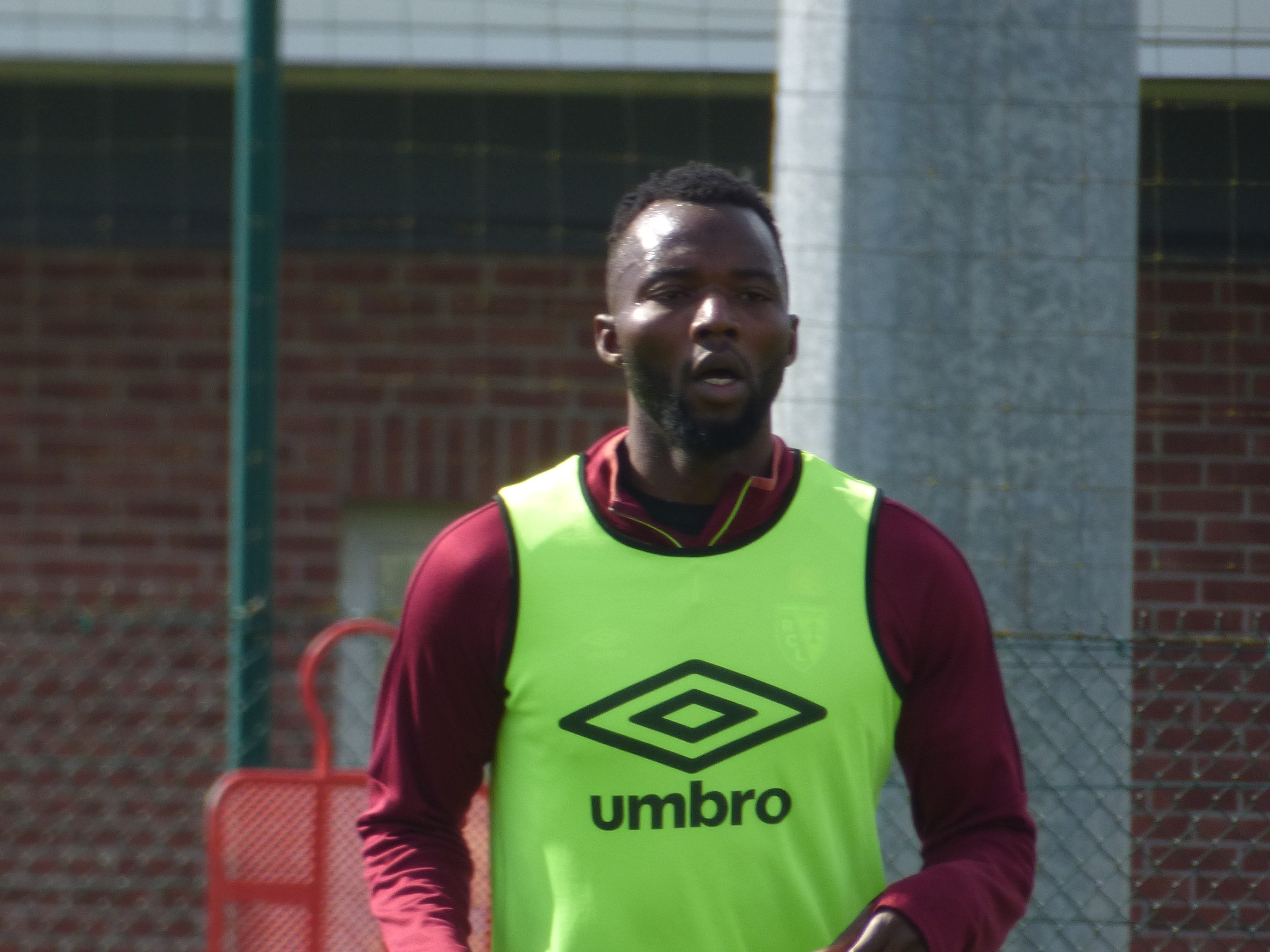 Djiman Koukou lors d'un entraînement public du Racing Club de Lens au Centre technique et sportif La Gaillette, le 2 mai 2018.